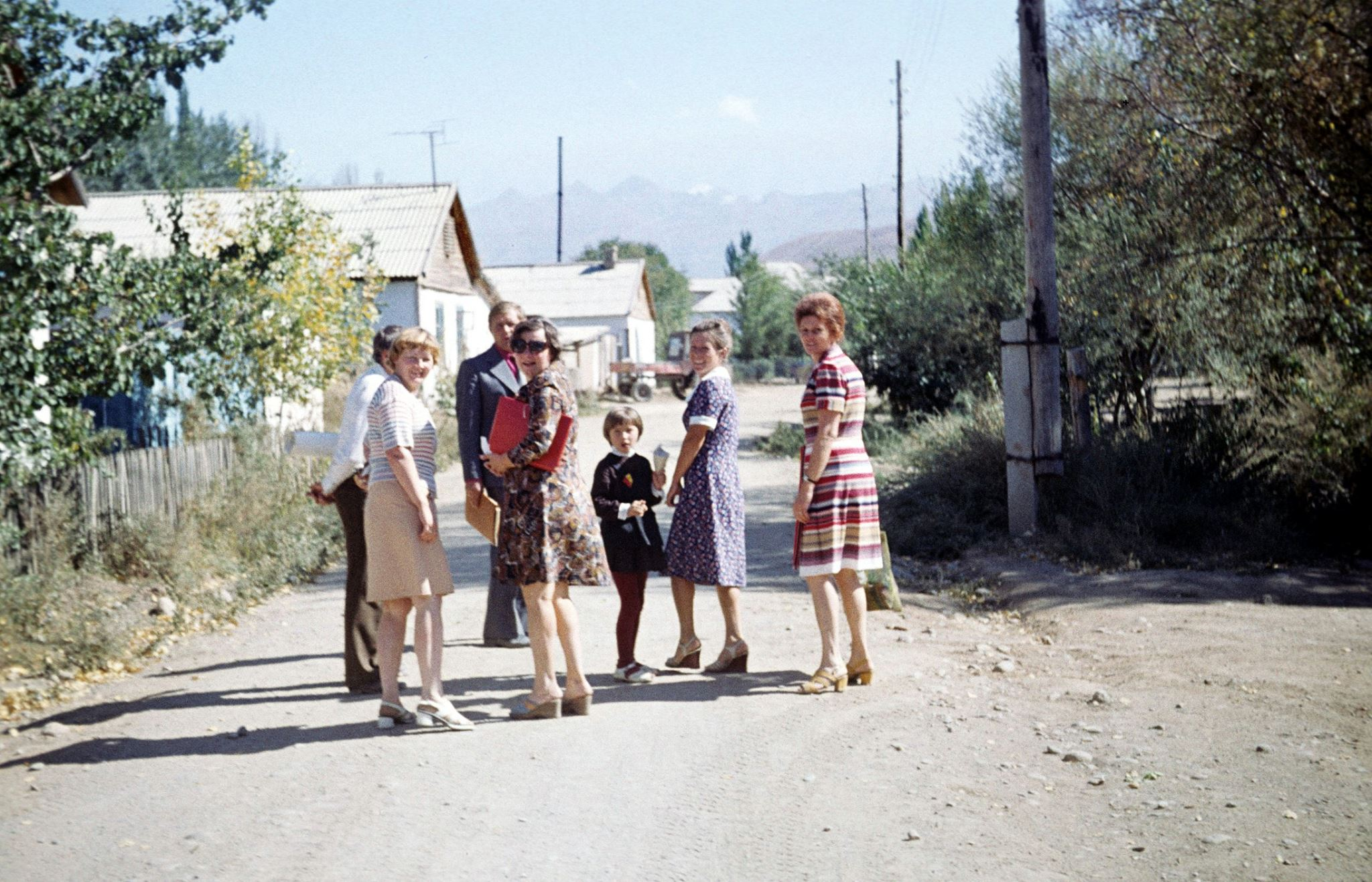 Село Покровка, Киргизская ССР.